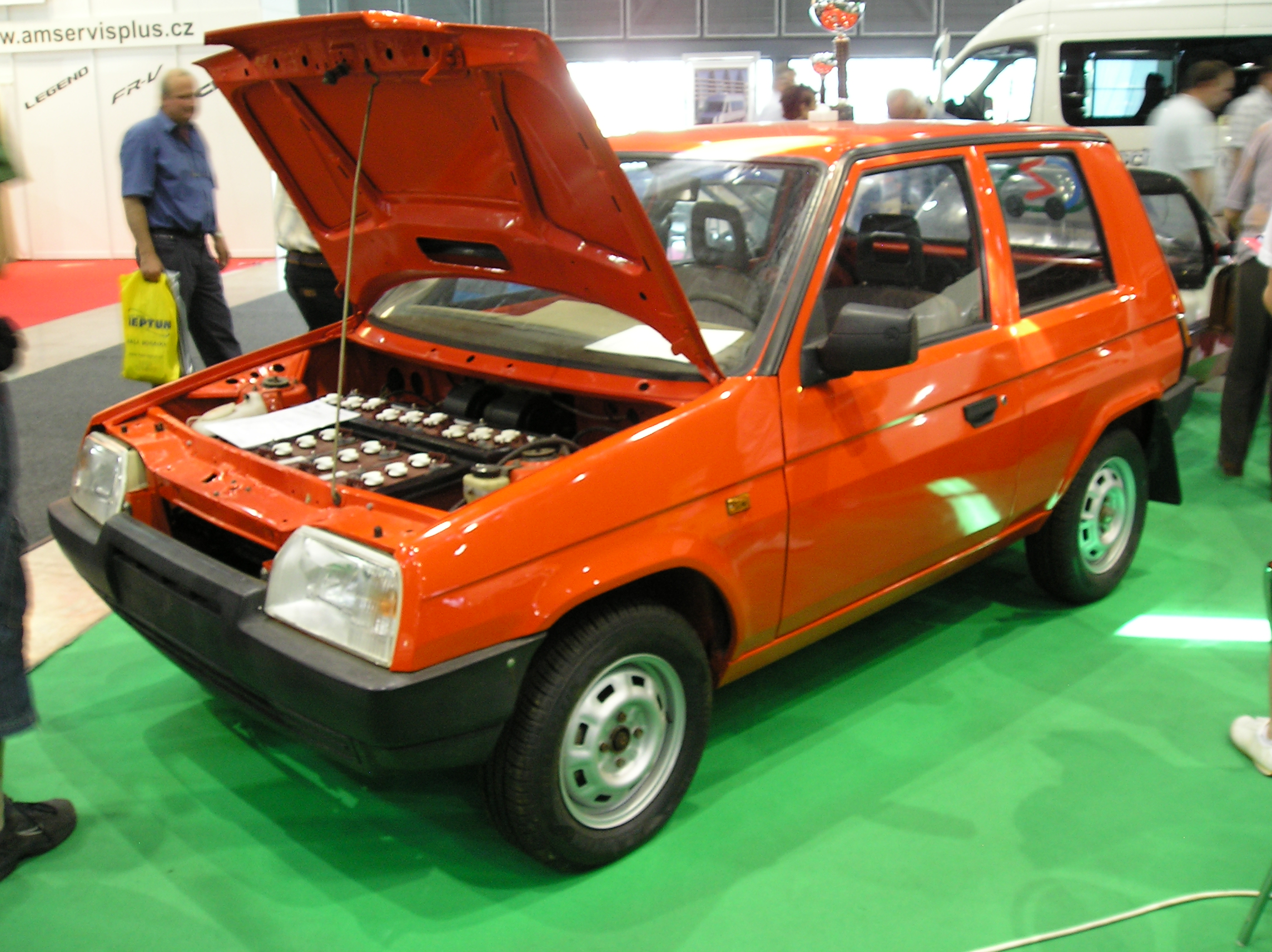 Škoda Shortcut na autosalonu v Brně